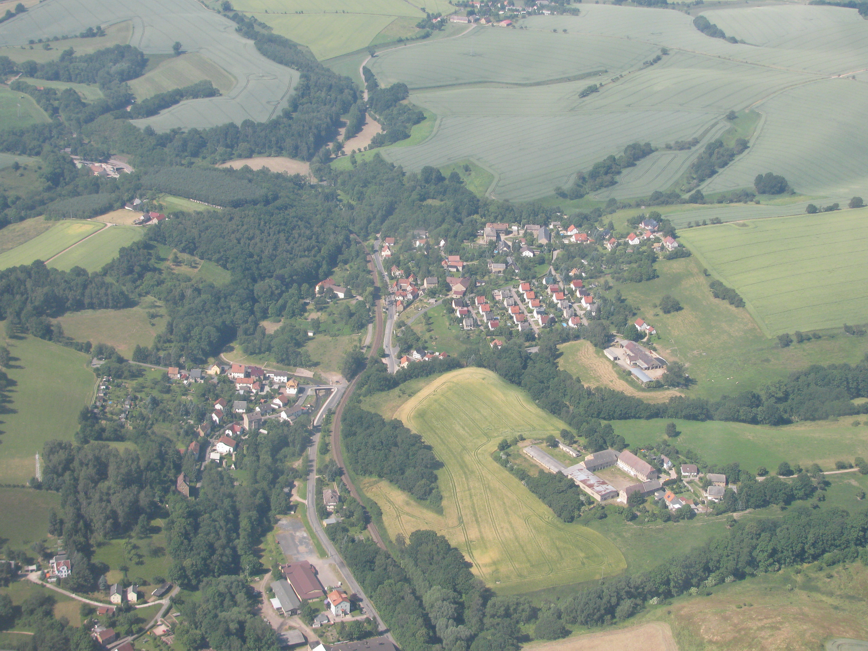 Luftbild Robschütz, Triebischtal